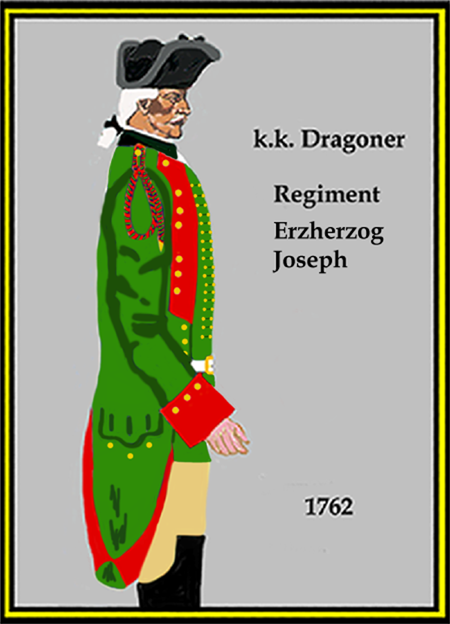 Österreichishes Dragoner-Regiment „Erzherzog Joseph“ 1762 (Aus: L.& F. Funcken - „L'Uniforme et les Armes des soldats de la guerre en dentelle II“) Castermann (Tournai 1976)